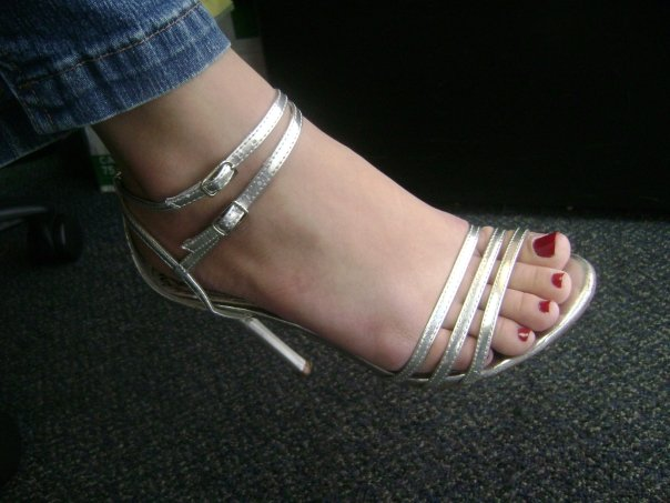 Uso de zapatos de de tacon